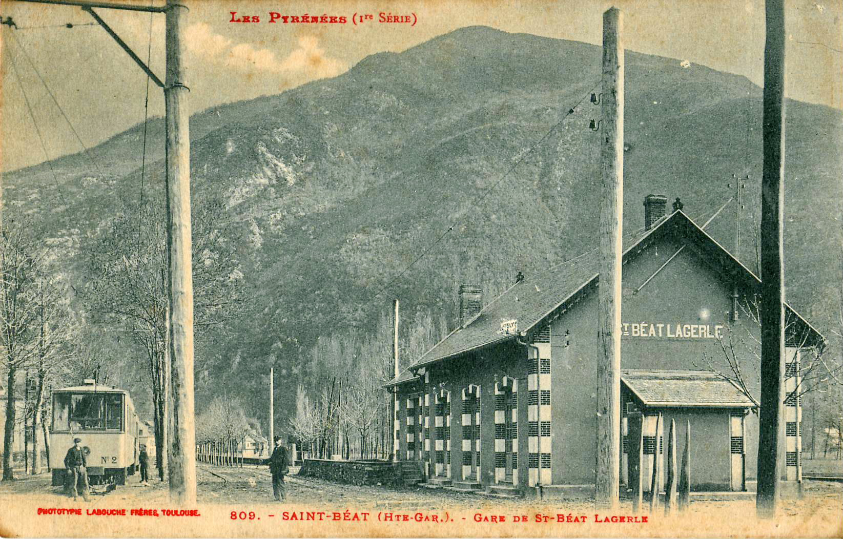 Carte postale ancienne éditée par Labouche Frères à Toulouse, collection Les Pyrénées (1ère série), n°809 : St-BEAT - Gare de St-Béat Lagerle